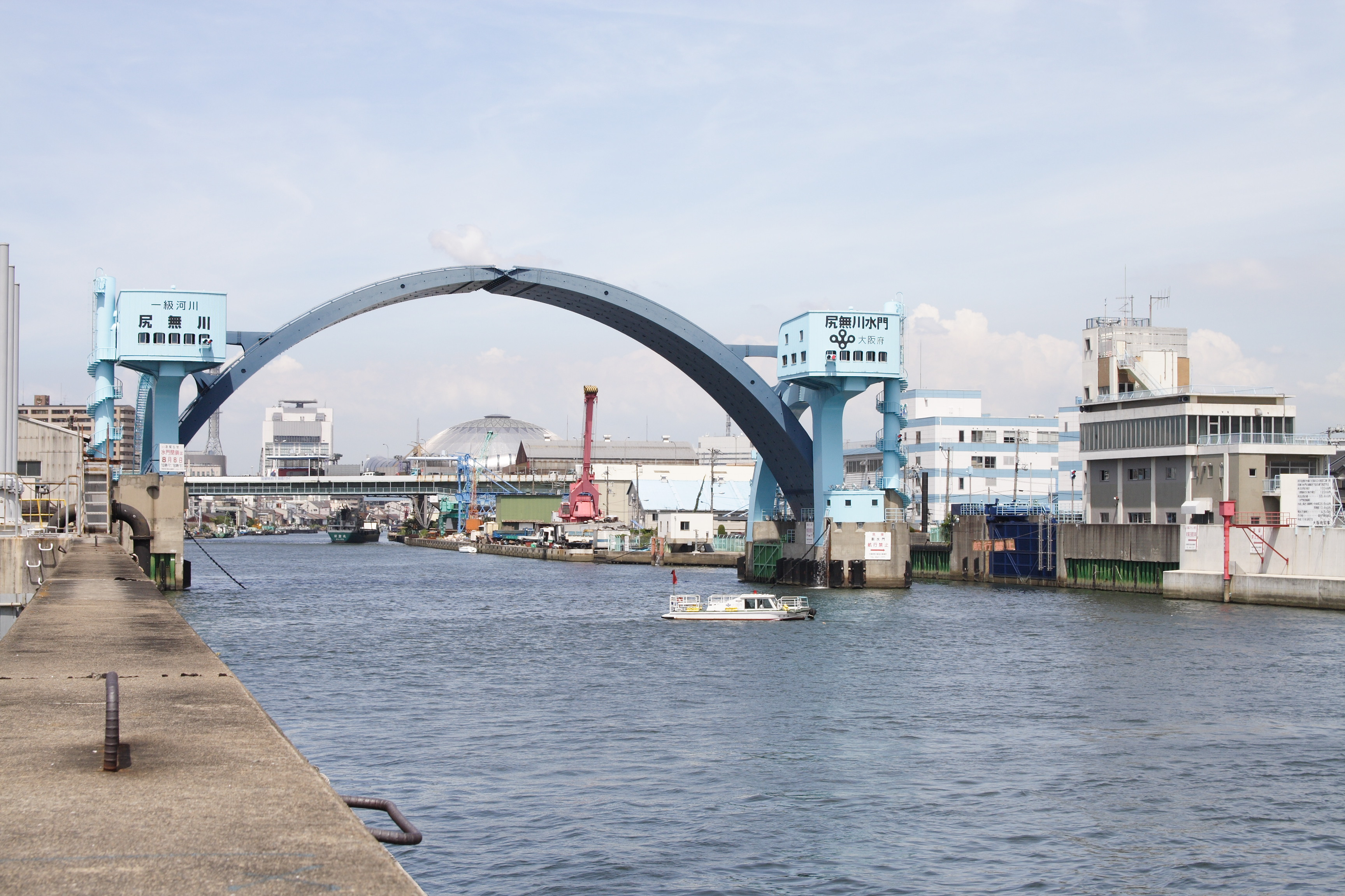 Kizugawa Suimon Gates/ 木津川水門